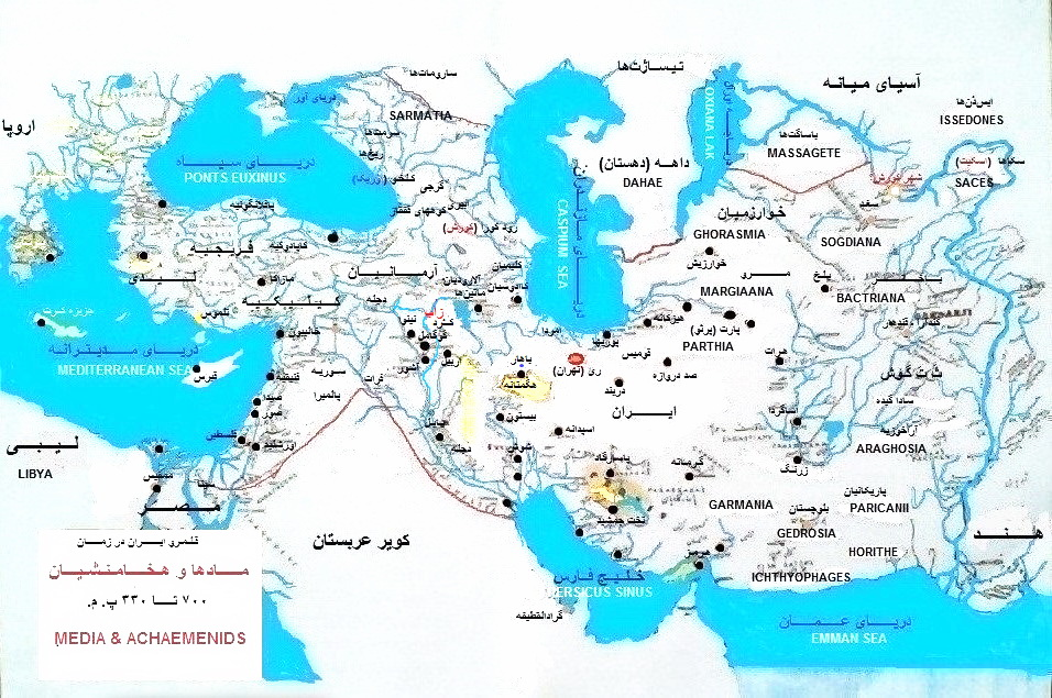 قلمرو ایران از دوران پادشاهی مادها، هخامنشایان تا حمله اسکندر مقدونی